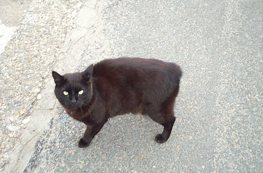 female Manx cat